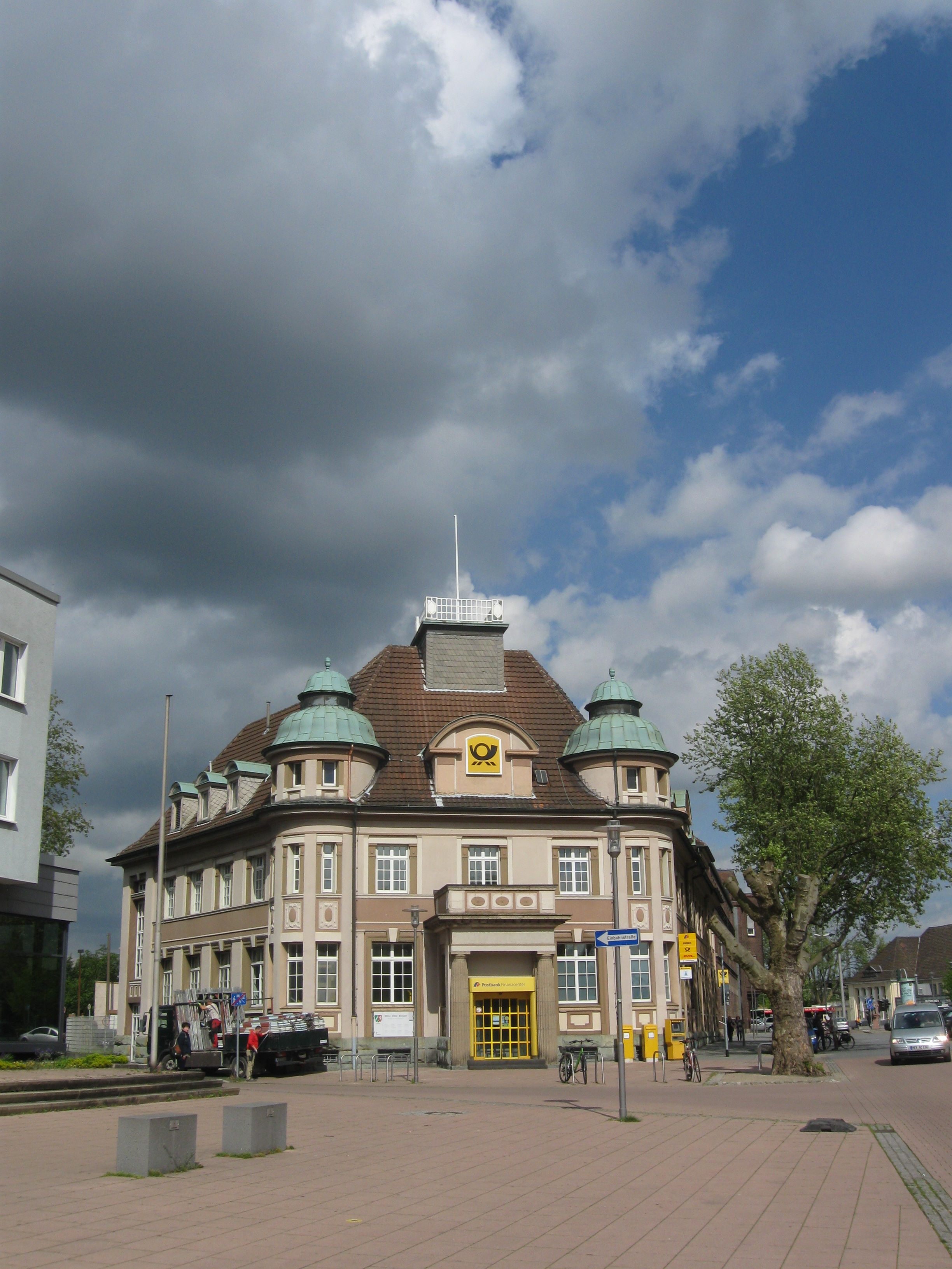 Postgebäude in Wanne-Mitte (erbaut 1912-14): Wanner Post (Finanzcenter), Wanner Straße 23-25, 44649 Herne